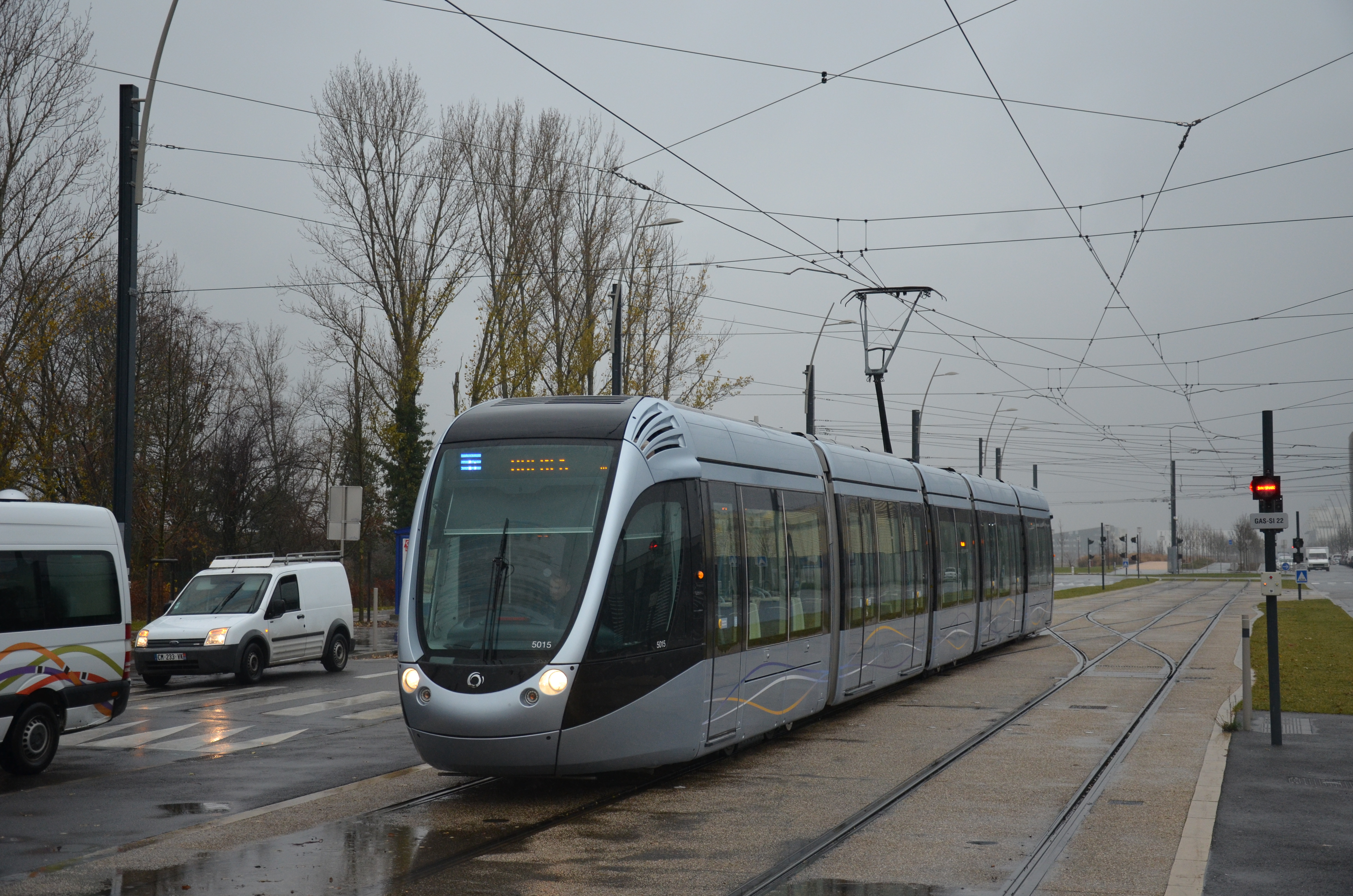 Alstom Citadis 302 n°5015 arrivant au terminus de la ligne T1 de Toulouse, Aéroconstellation.